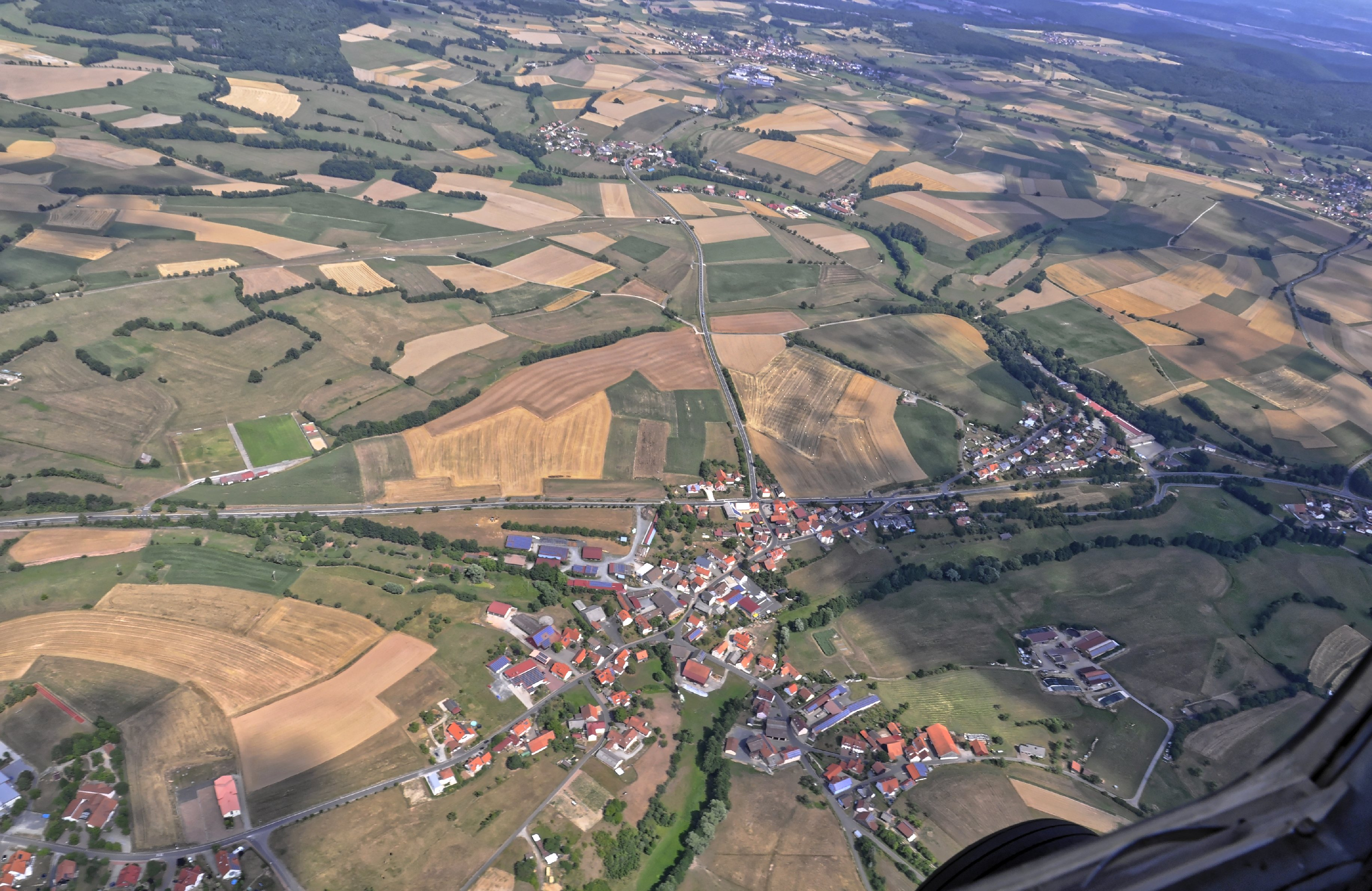 Bilder vom Flug Nordholz-Hammelburg 2015: Unterleichtersbach